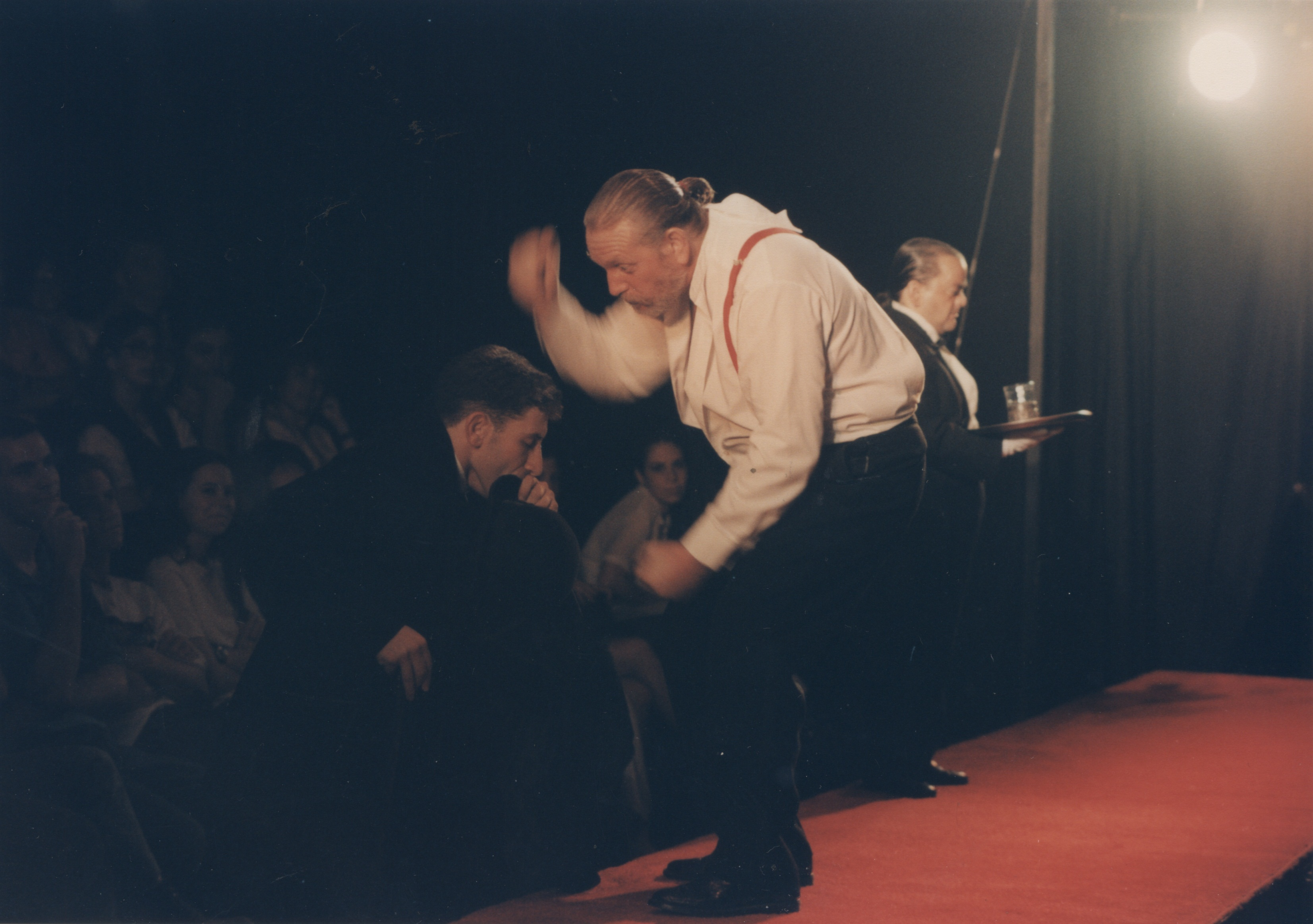 רוזנקרנץ וגילדנשטרן מתים בתיאטרון גשר